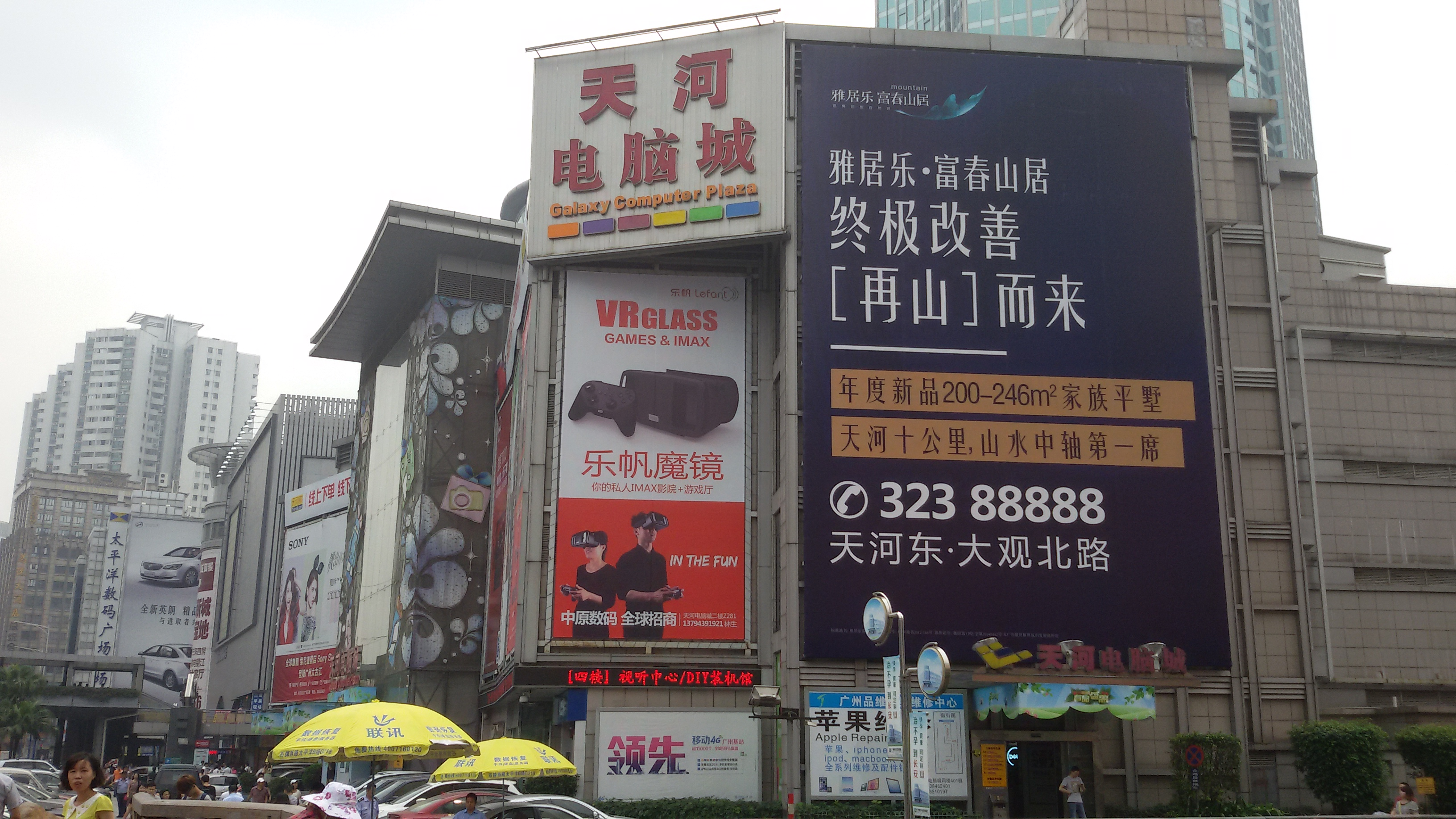 粵語: 天河電腦城